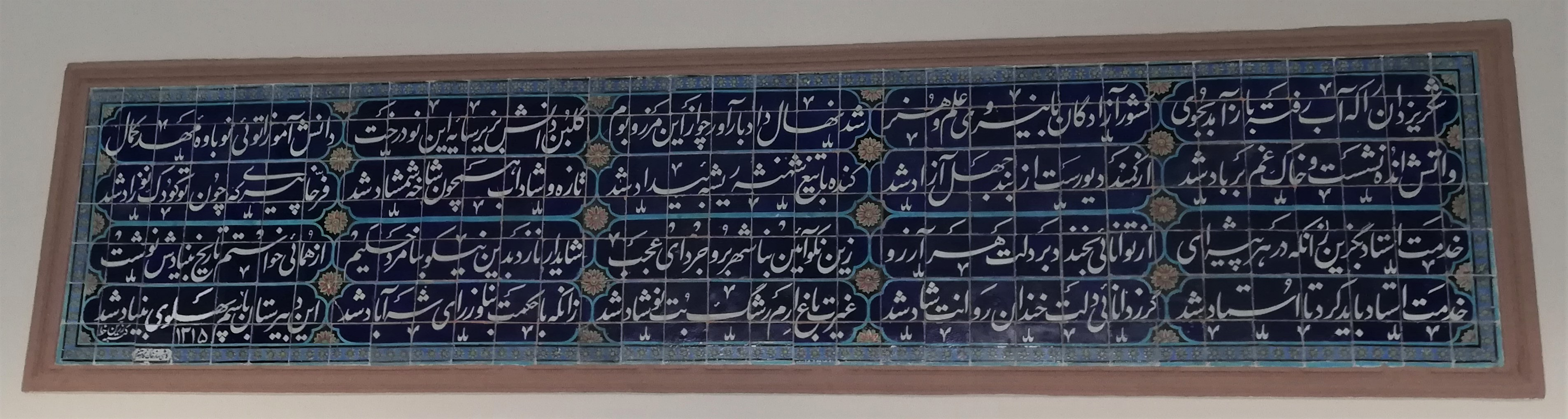 جزئیات معماری دبیرستان پهلوی بروجرد